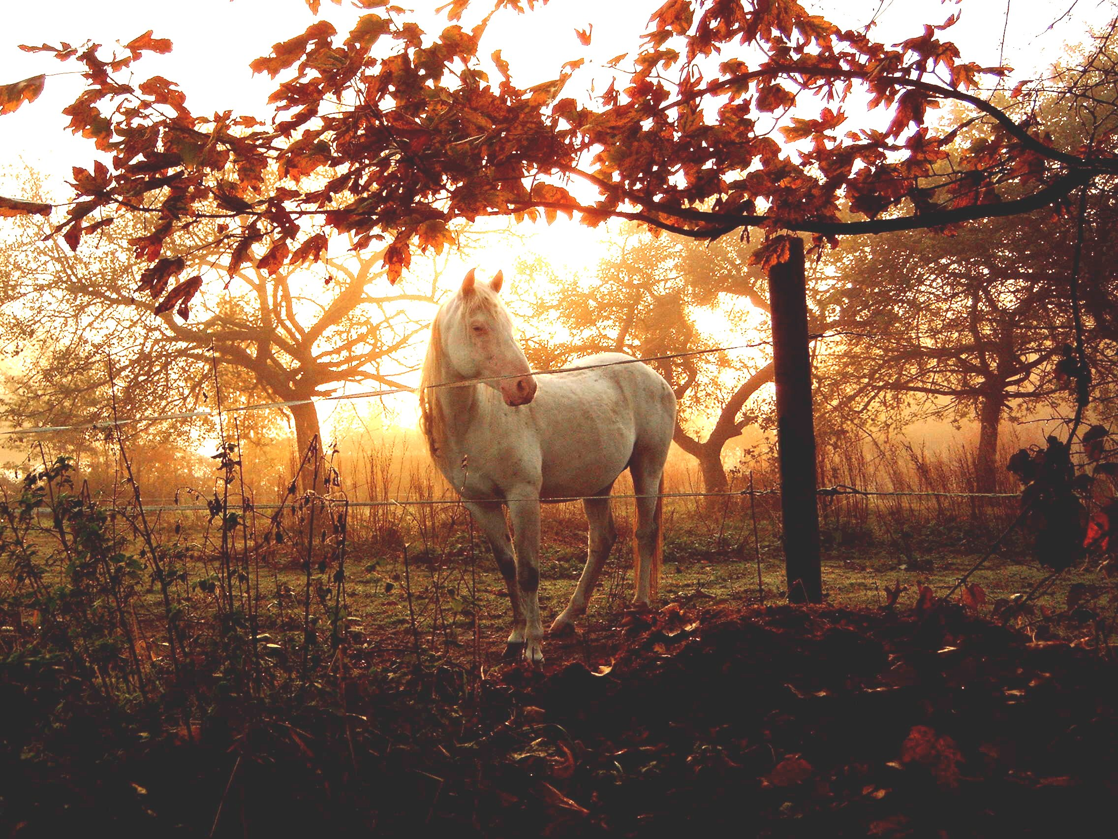 Eigen opname van een oud paard. Foto: Michiel van Kempen.